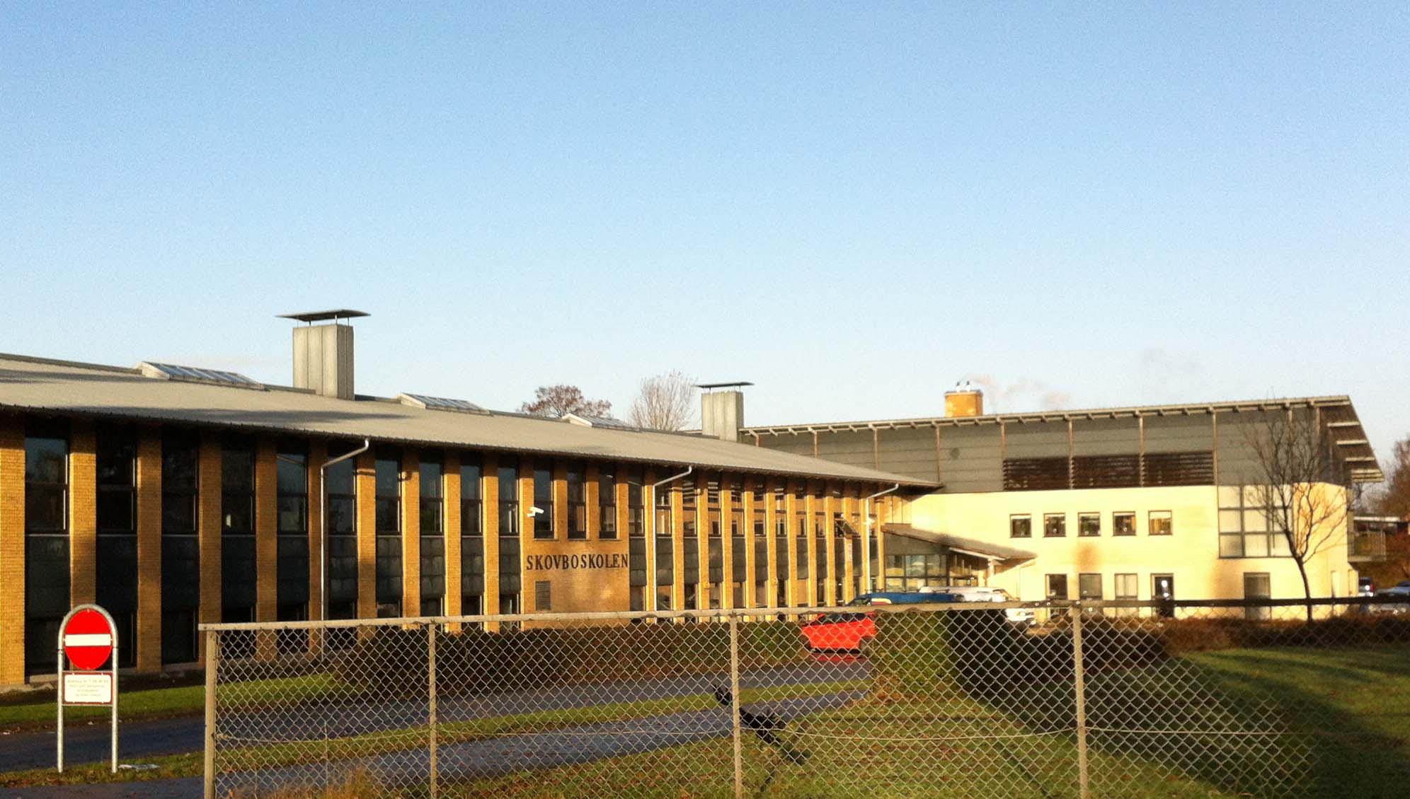 Skovboskolen i Bjæverskov